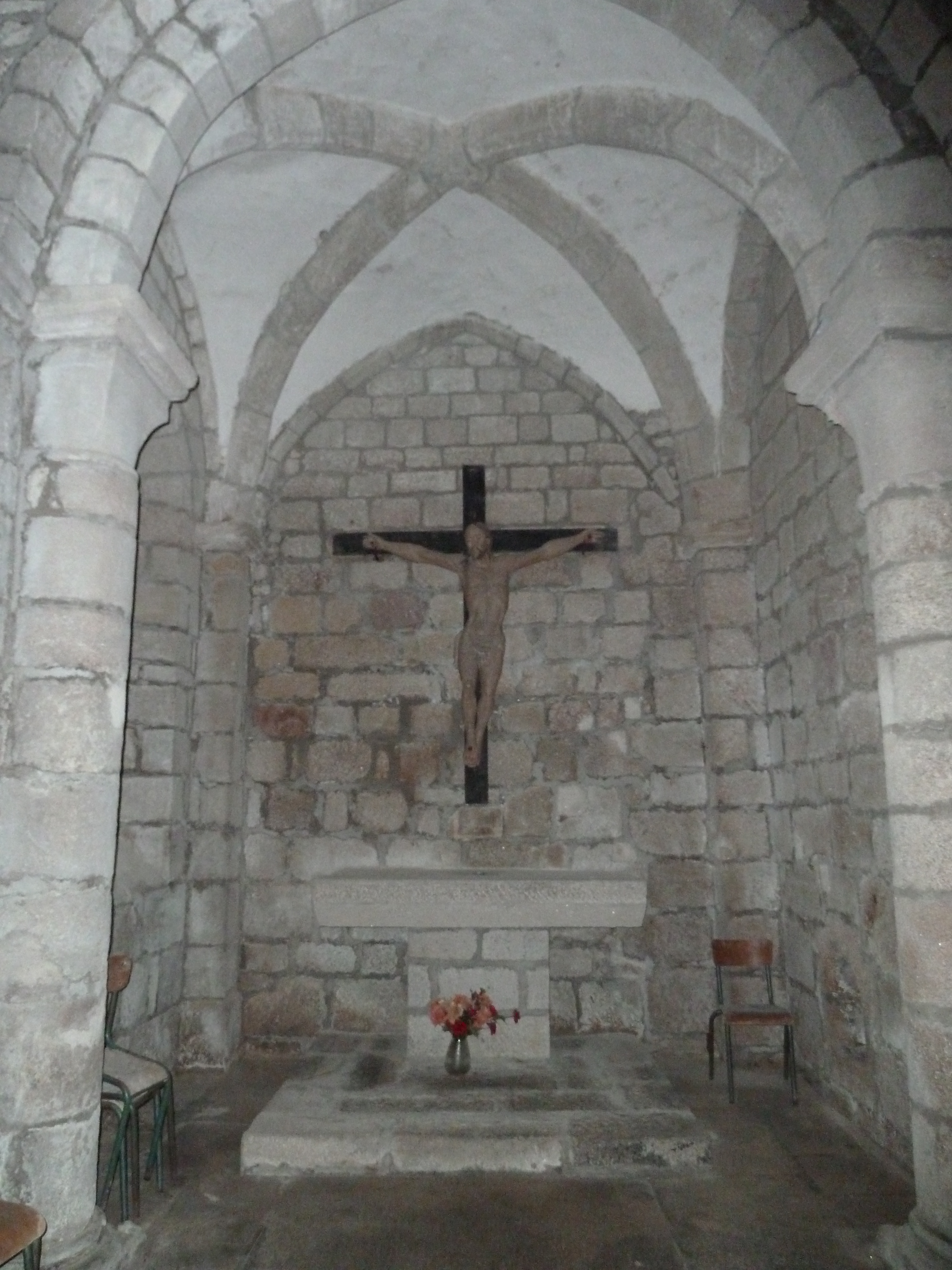 Razès Eglise - Choeur